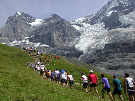 Kilometer 40 beim Jungfrau-Marathon 2004. Berge von links: Eiger, Klein-Eiger und Mönch. Darunter der Eigergletscher.